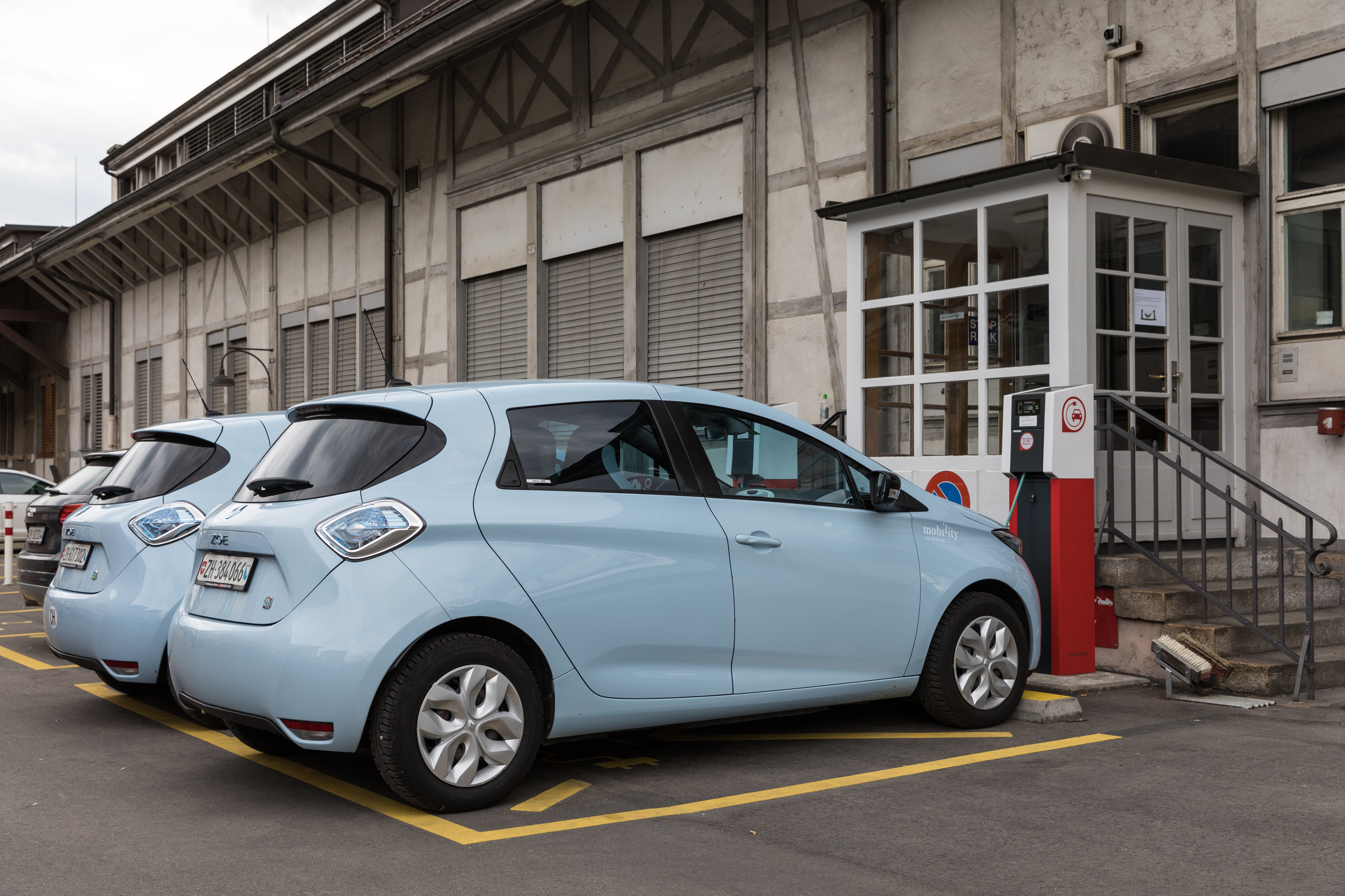 mobility in hellblau: Renault Zoe ZE an der Ladestation in Winterthur